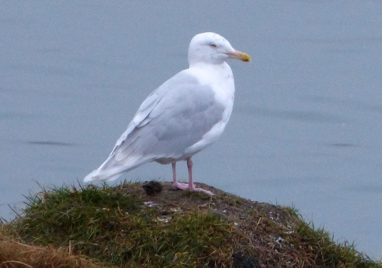 Iceland Gull Larus glaucoides, Olafsvik, Snaefellsnesog Hnappadalssysla, Iceland.